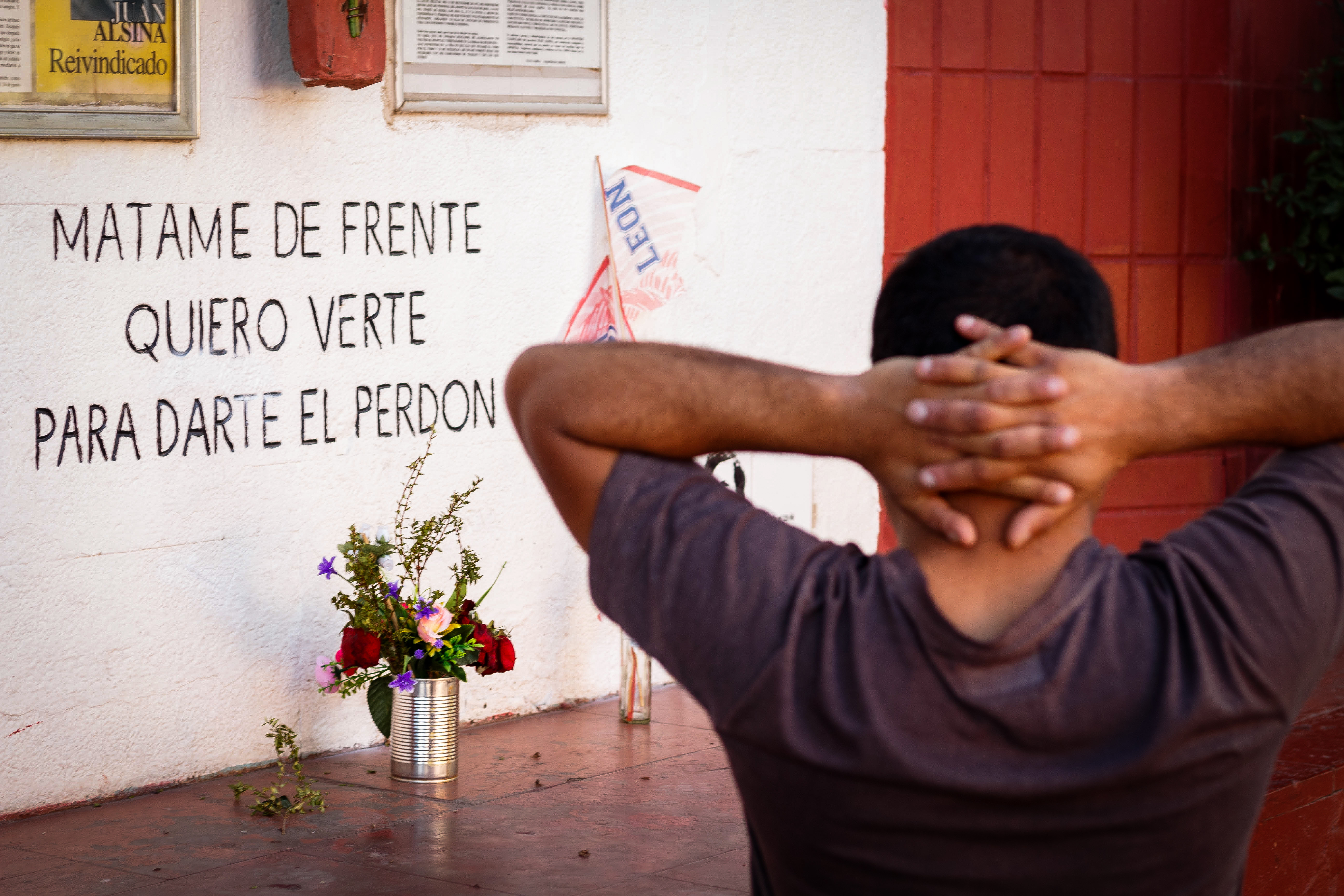 Memorial Puente Bulnes, Muro de la Memoria y Plaza Joan Alsina